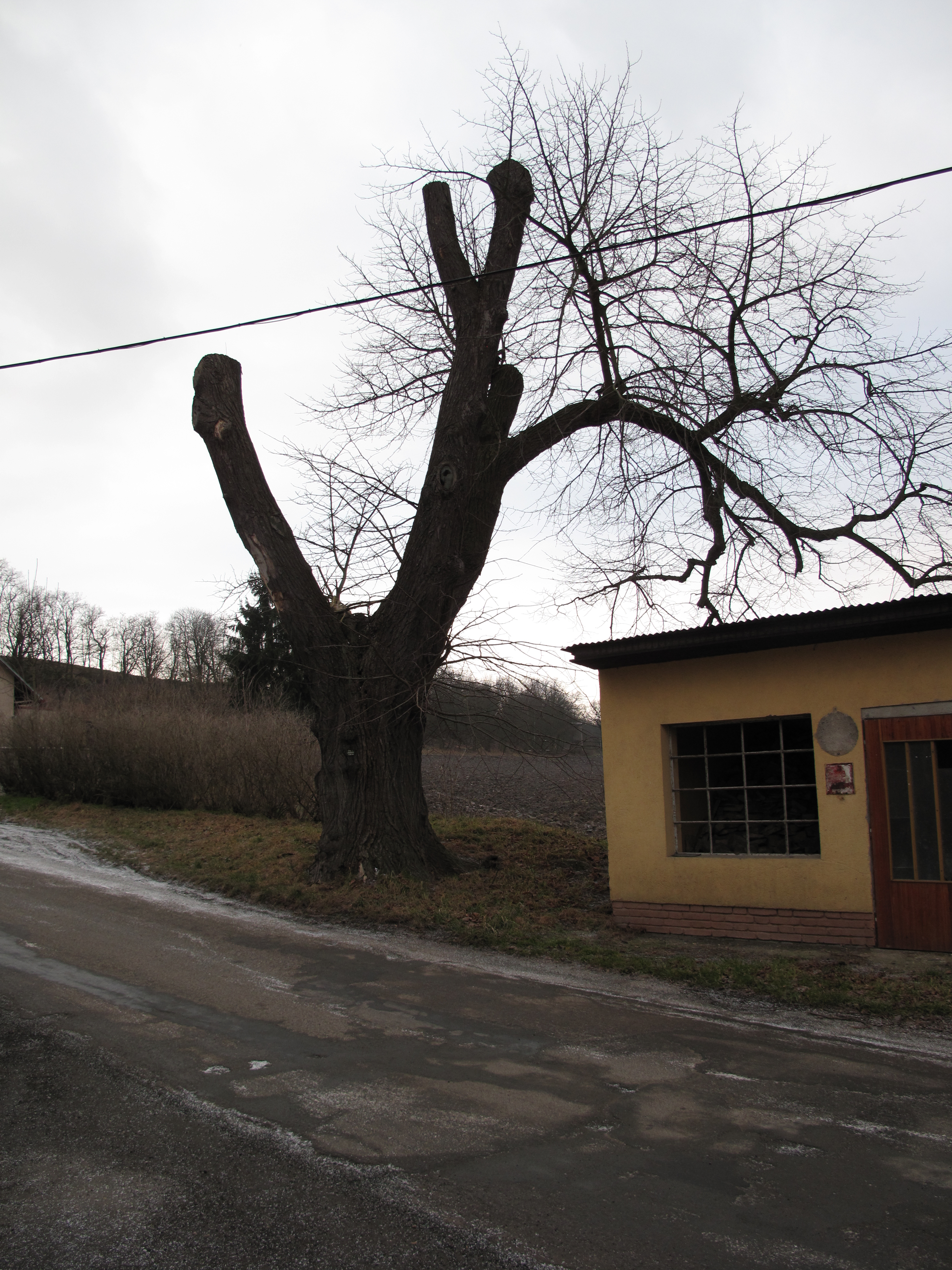 Památný strom v Otrubách. Okres Kladno, Česká republika. Object location50° 15′ 03.52″ N, 14° 05′ 02.79″ E